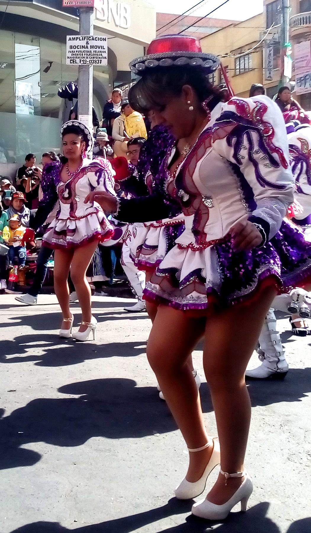 La Paz Bolivia 2017